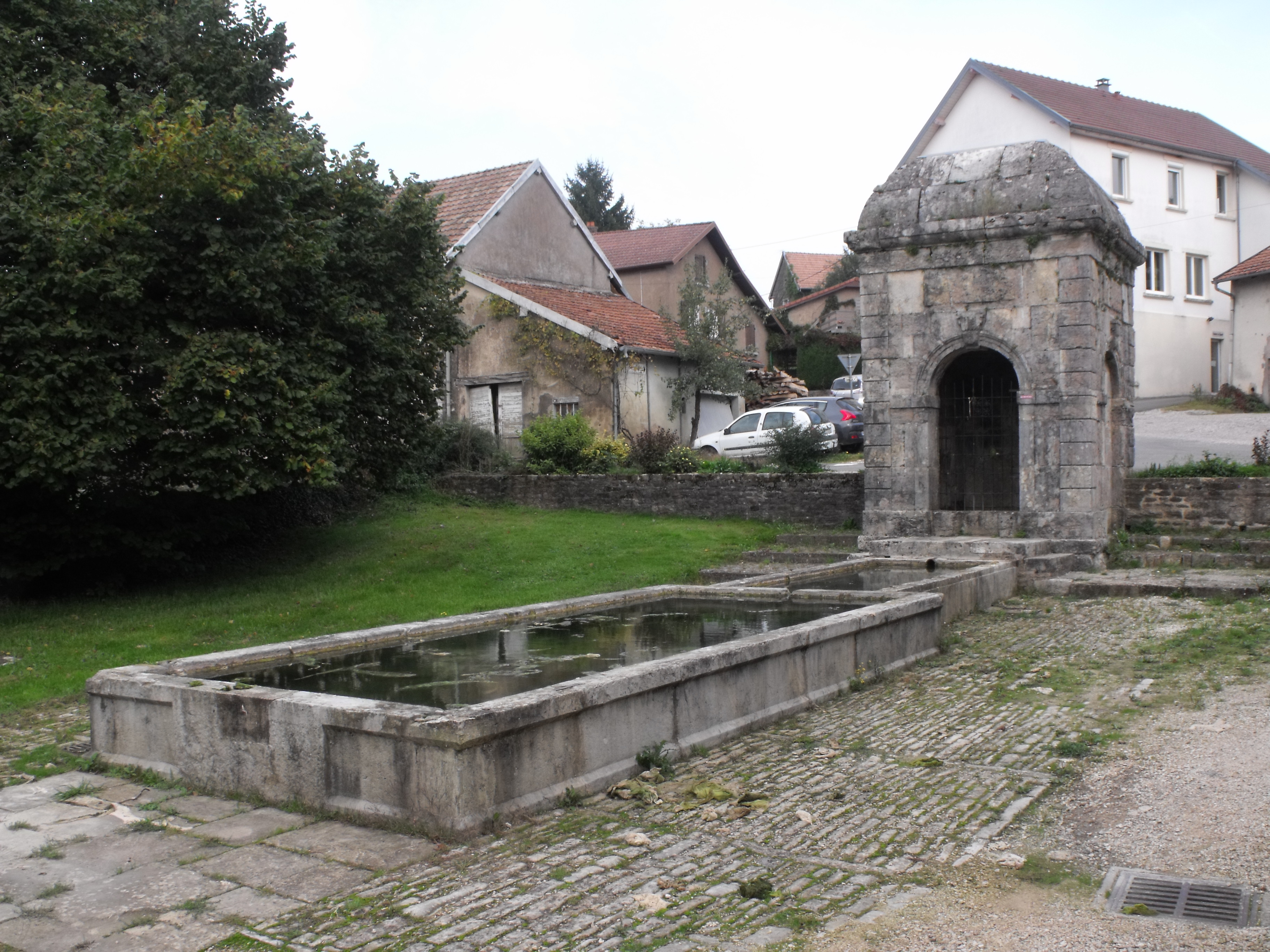 Fontaine de Sainte-Marie (Inscrit) .